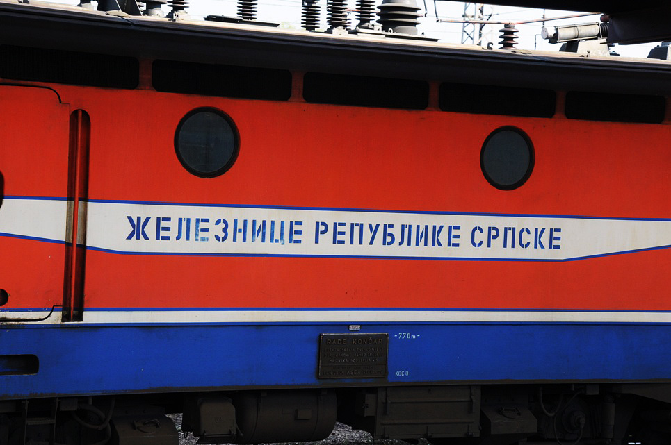 (Banja Luka)